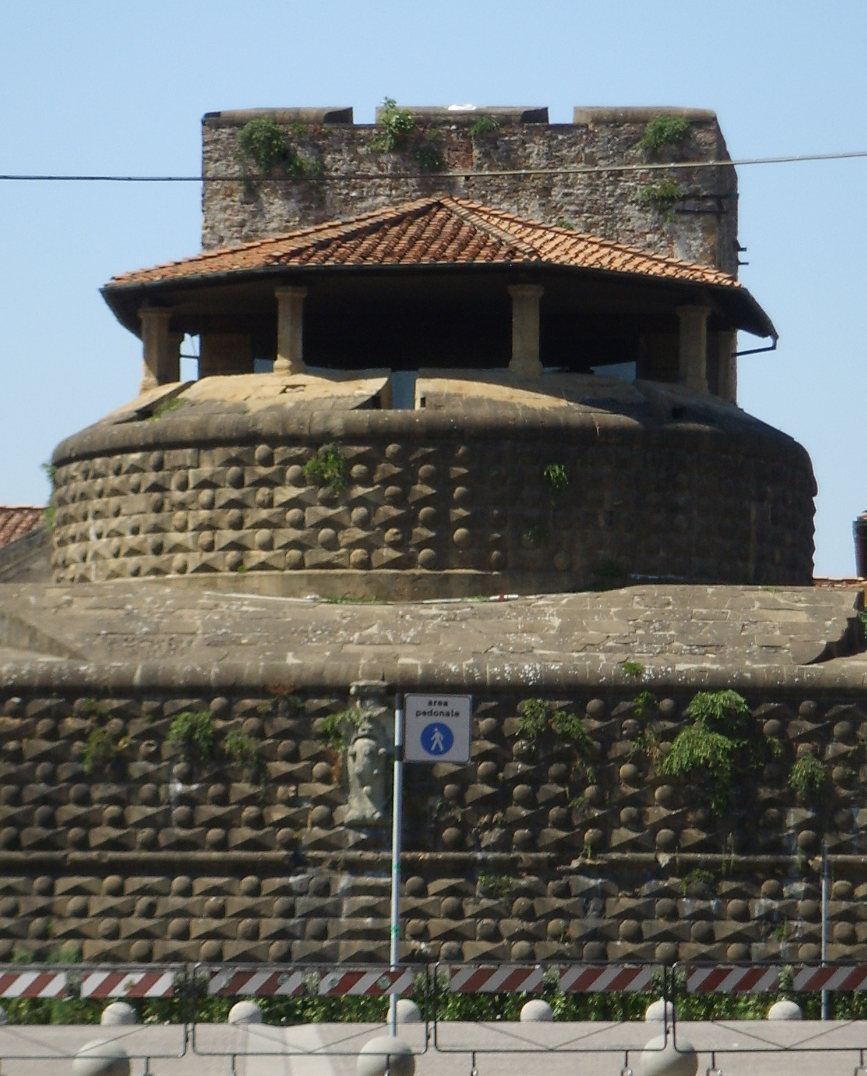 Porta Faenza (in the Fortezza da Basso) in Florence, Italy